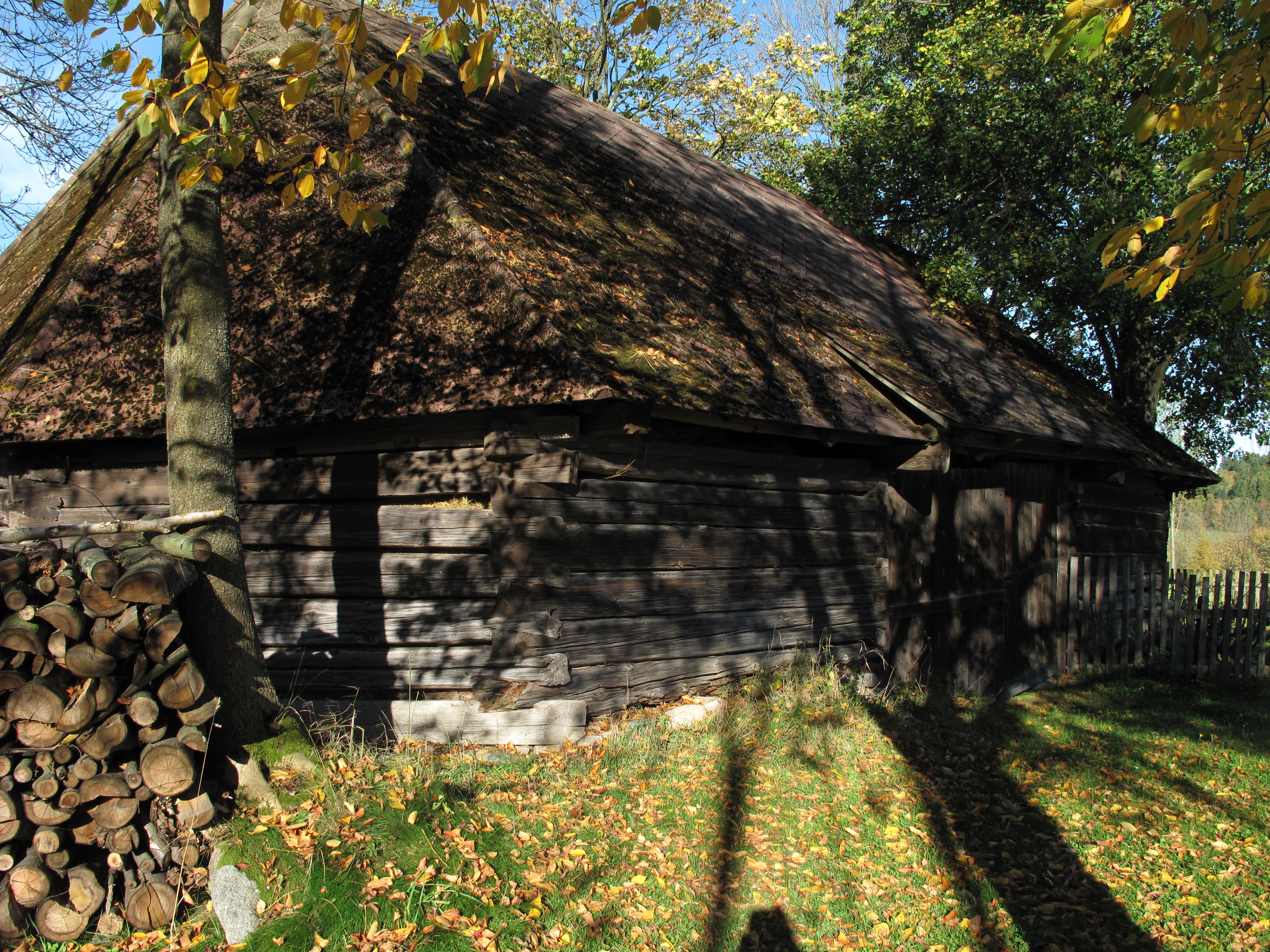 Roubená stodola ve Veletíně. Okres Příbram, Česká republika.